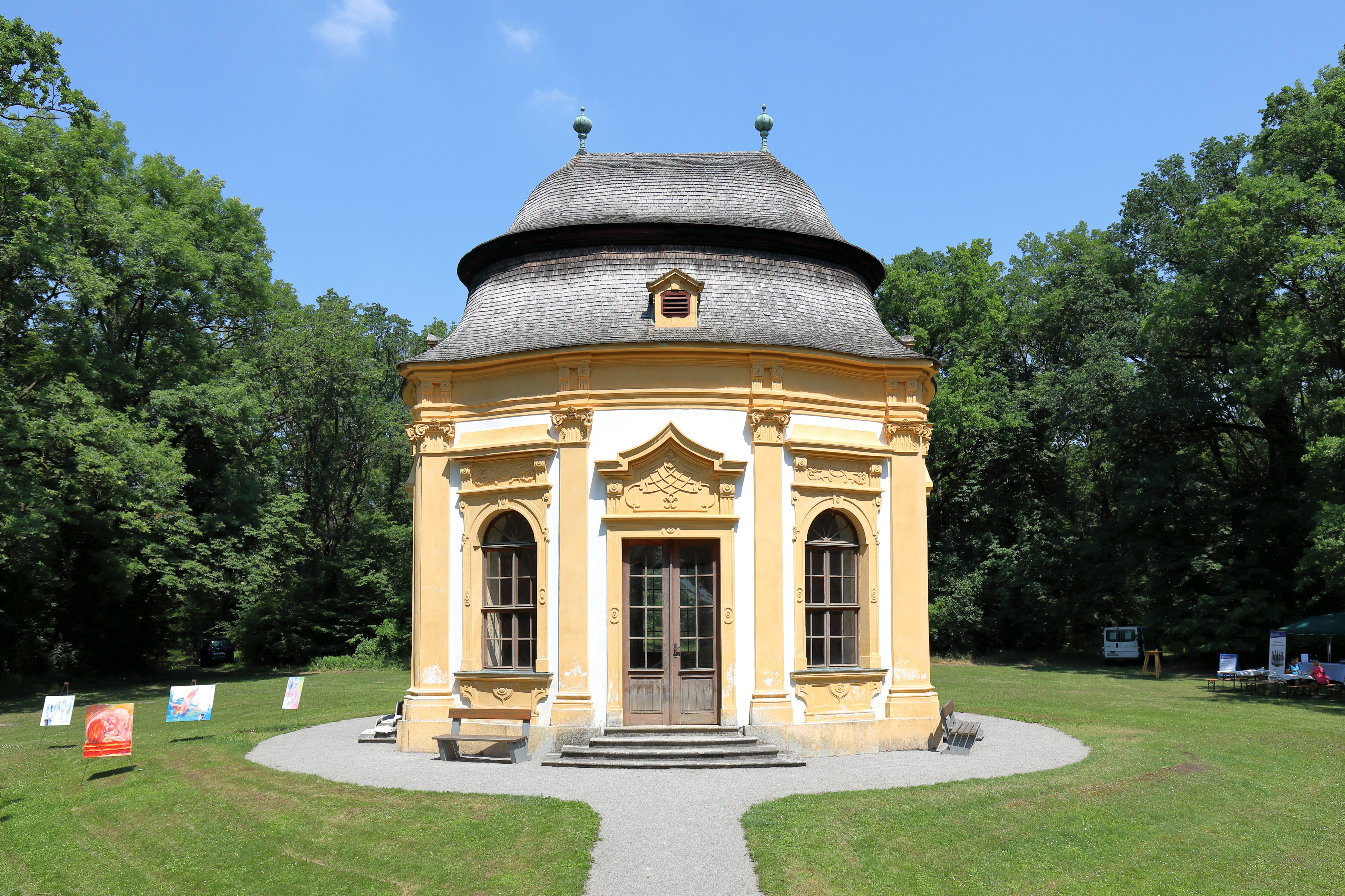 Der Gartenpavillon des Schlosses Obersiebenbrunn in der niederösterreichischen Marktgemeinde Obersiebenbrunn. Der barocke Bau wurde von Johann Lucas von Hildebrandt entworfen und 1728 im Zentrum eines Jagdsterns errichtet.